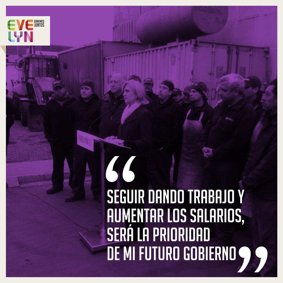 Evelyn Matthei - 'Seguir dando trabajo...'